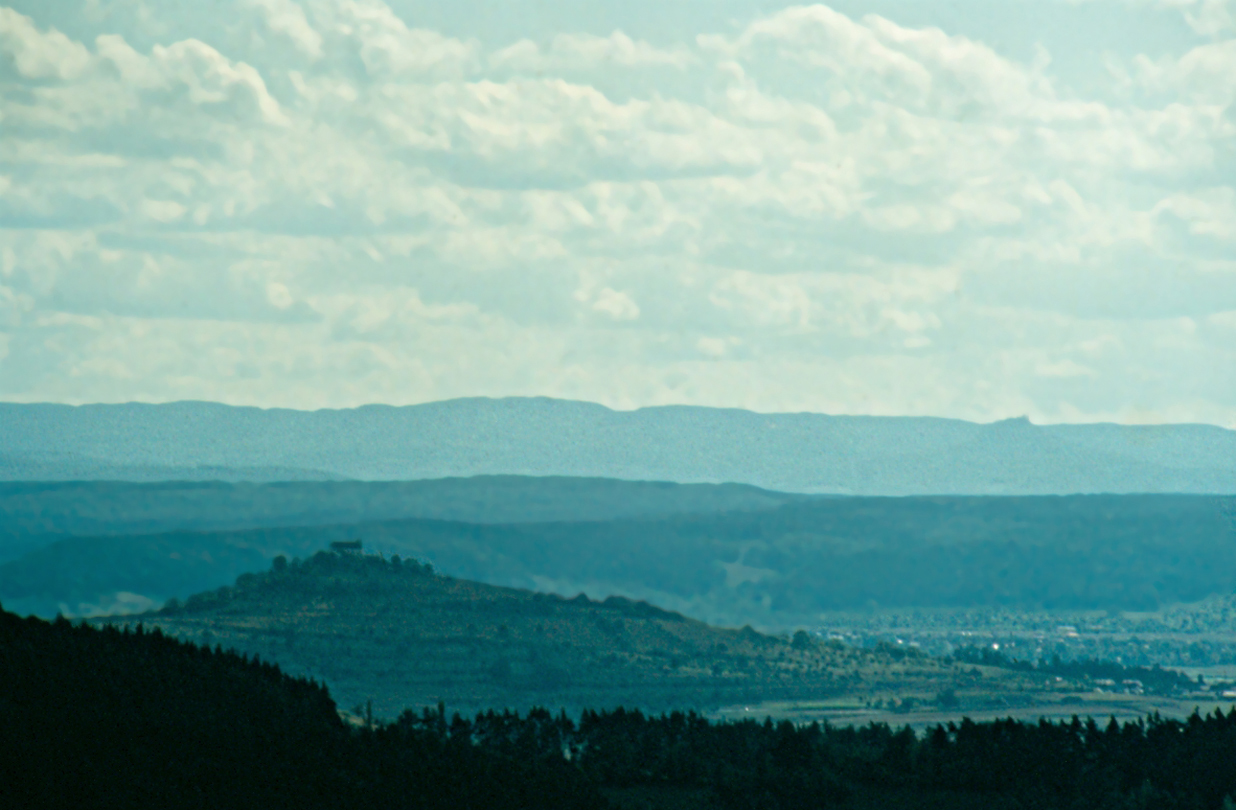 Schönbuch in den 80er-Jahren Wurmlinger Kapelle und Schwäbische Alb vom Schönbuch aus gesehen Die Wurmlinger Kapelle (Nikolaus Lenau) Luftig, wie ein leichter Kahn, Auf des Hügels grüner Welle Schwebt sie lächelnd himmelan, Dort die friedliche Kapelle.